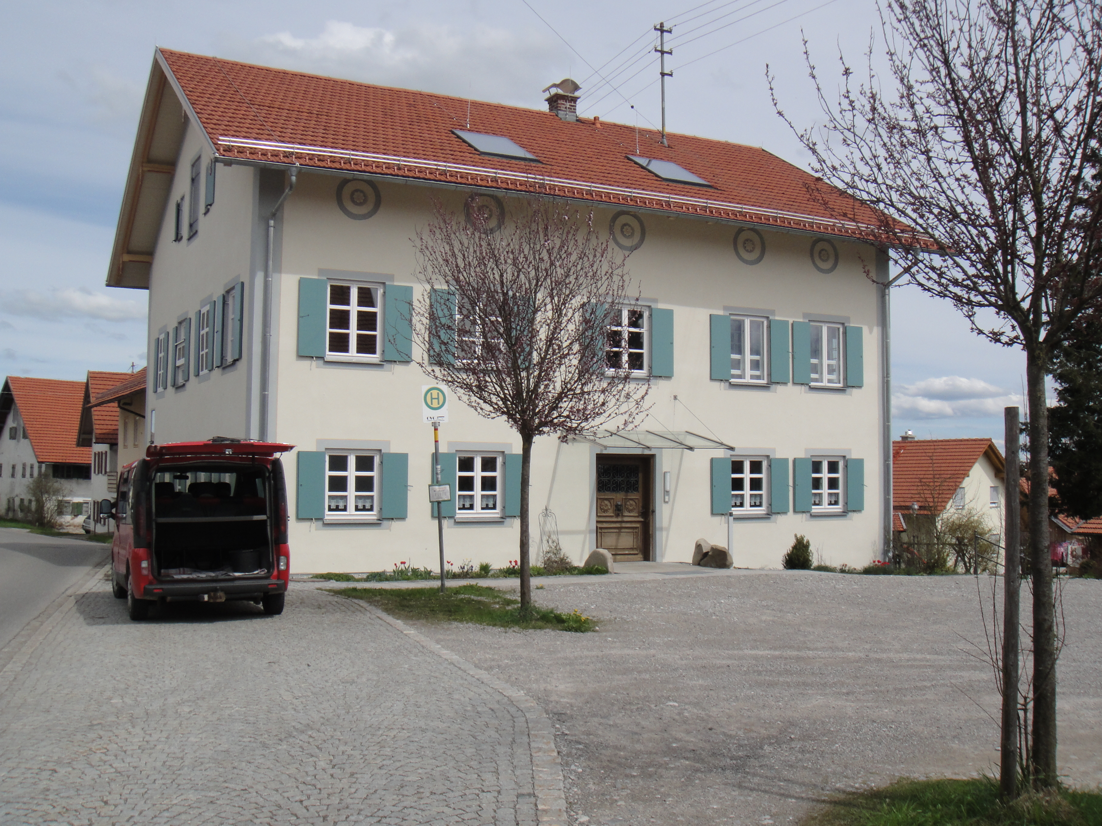 Apfeltranger Dorfstrasse 38, ehemals Haus Nr. 43, Pfarrhaus der Kirche St. Michael in Apfeltrang, saniert von 2004-2006. 2008 Denkmalpreis des LKR Ostallgäu